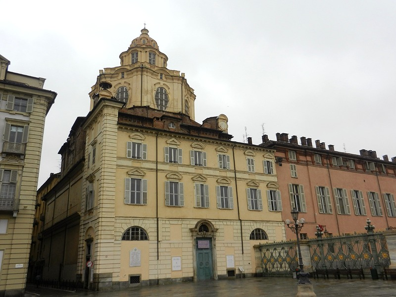 Torino - Chiesa di S. Lorenzo